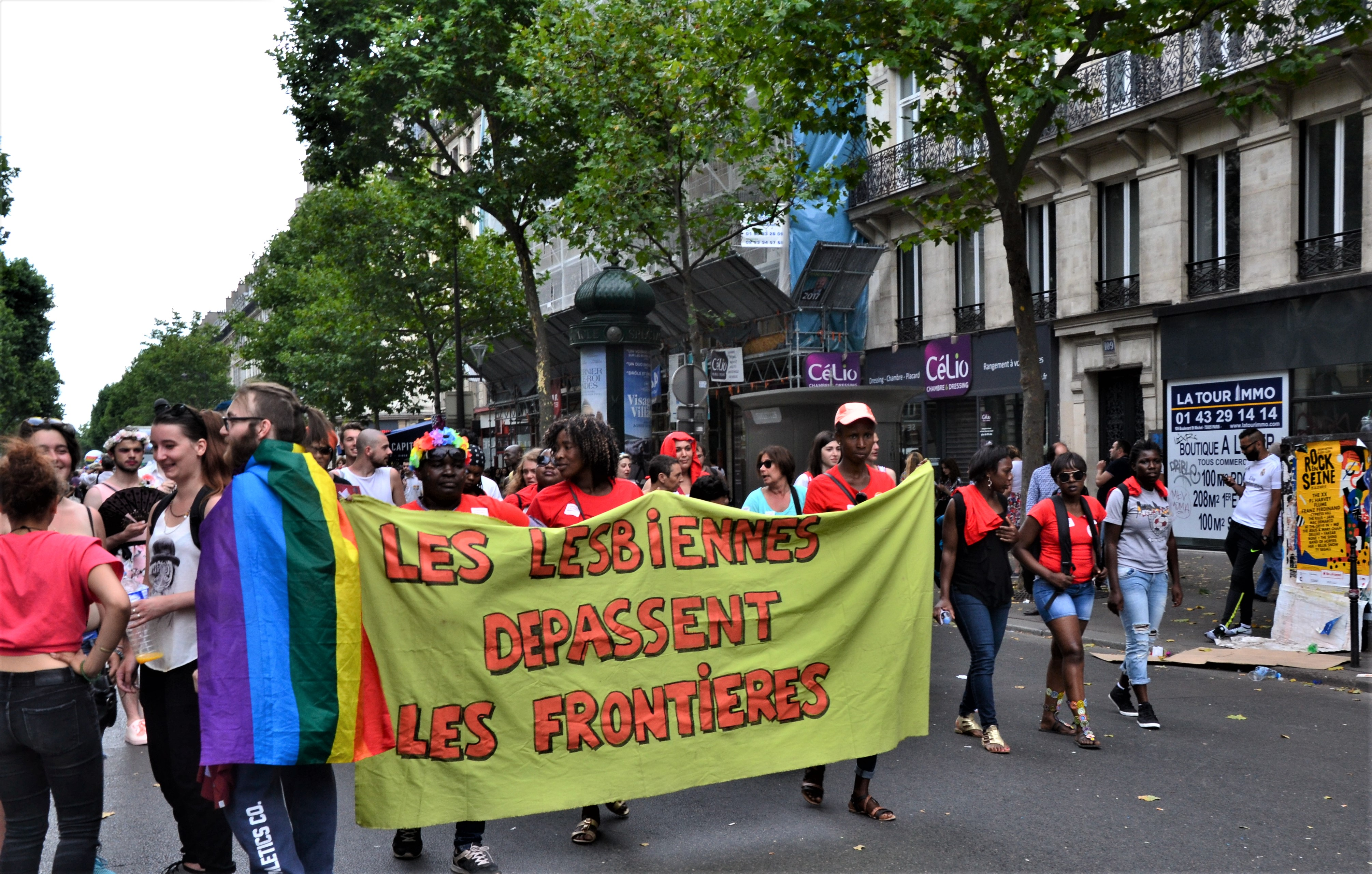 Les lesbiennes dépassent les frontières Paris Gay Pride 2017.